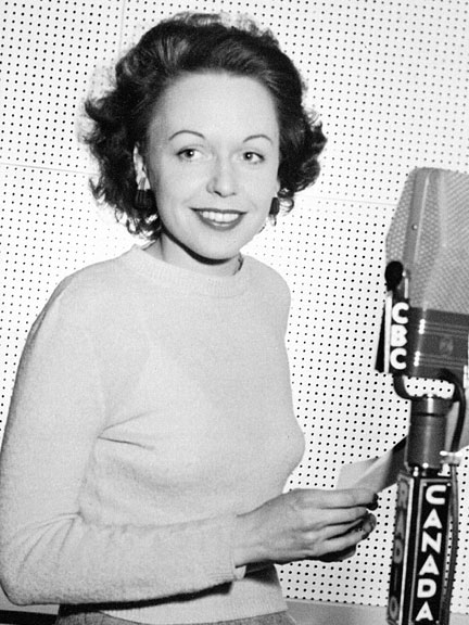 Michelle Tisseyre à ses débuts à la radio de la Société Radio-Canada